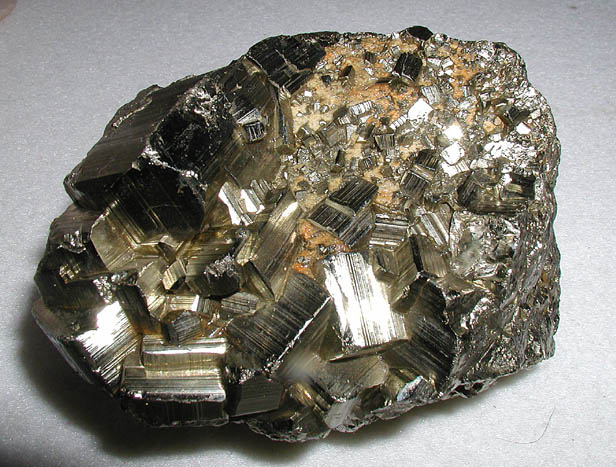 Pirita FeS2